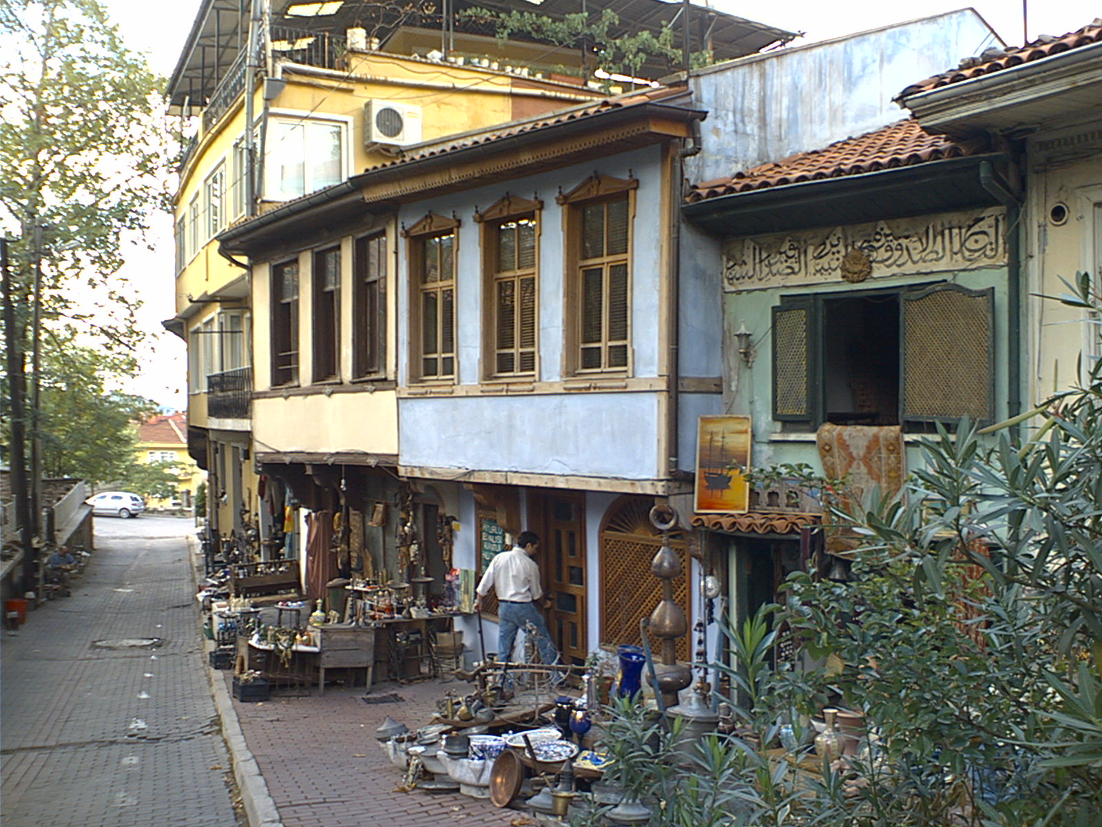 Piccoli negozi di anticaglie nei dintorni della Moschea Verde a Bursa, Turchia. Immagine realizzata da pnc_net.